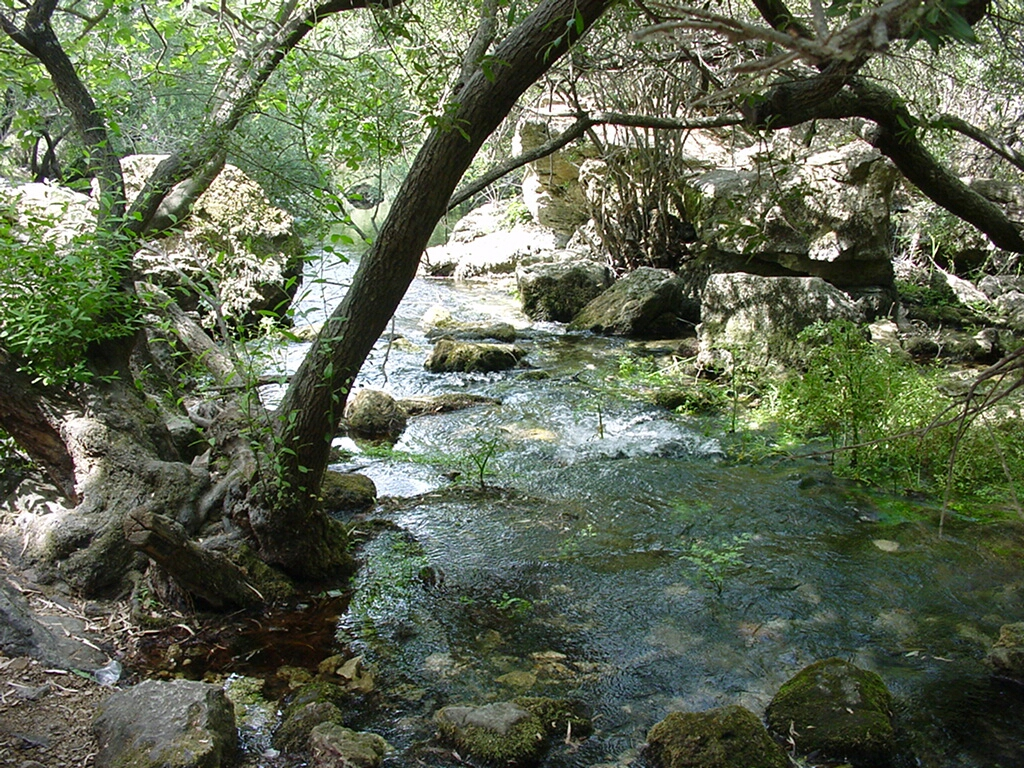 Oliena